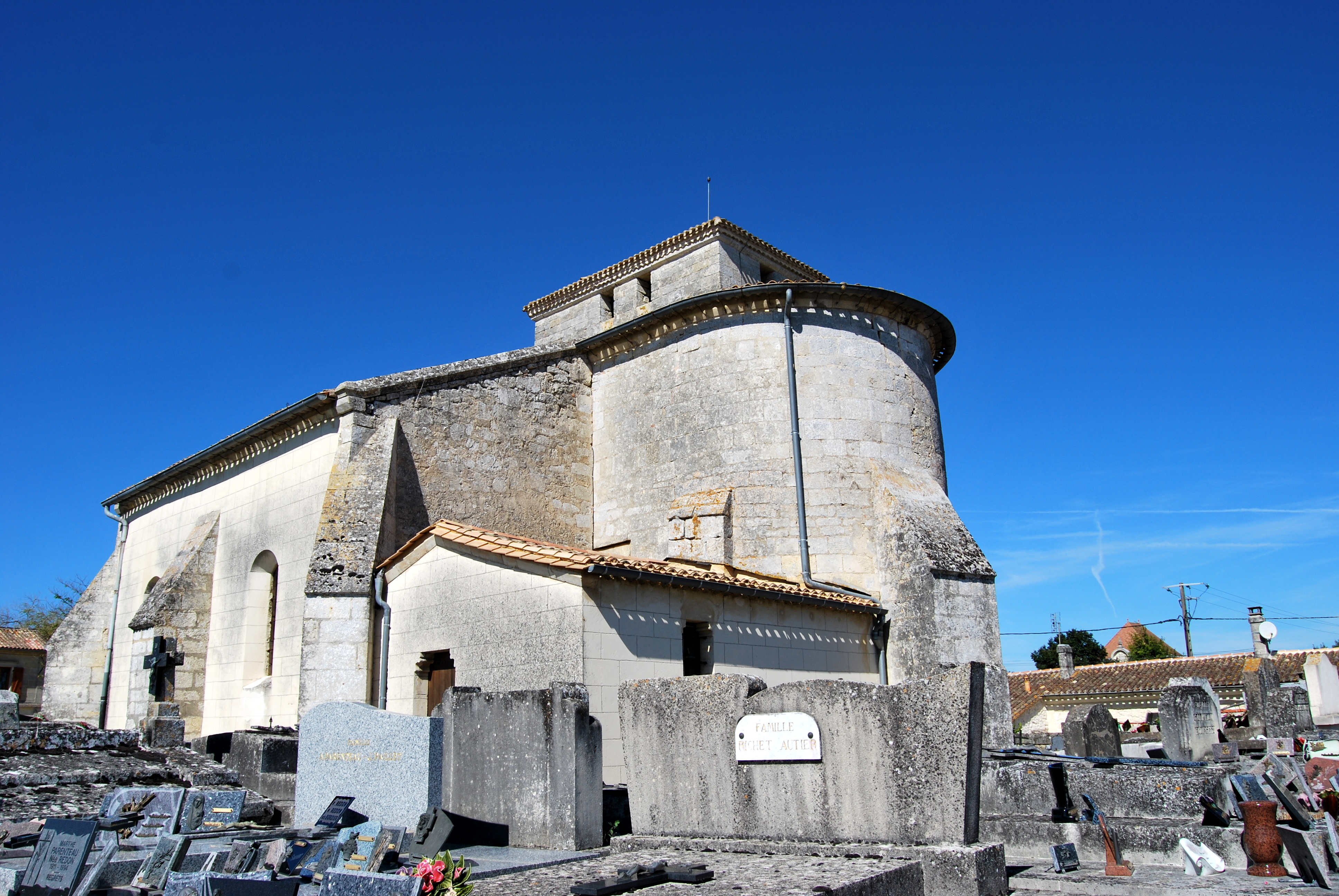 Église de Saint-Genès-de-Fronsac?UNIQ772a8ffb8bca9c80-ref-00000006-QINU? .